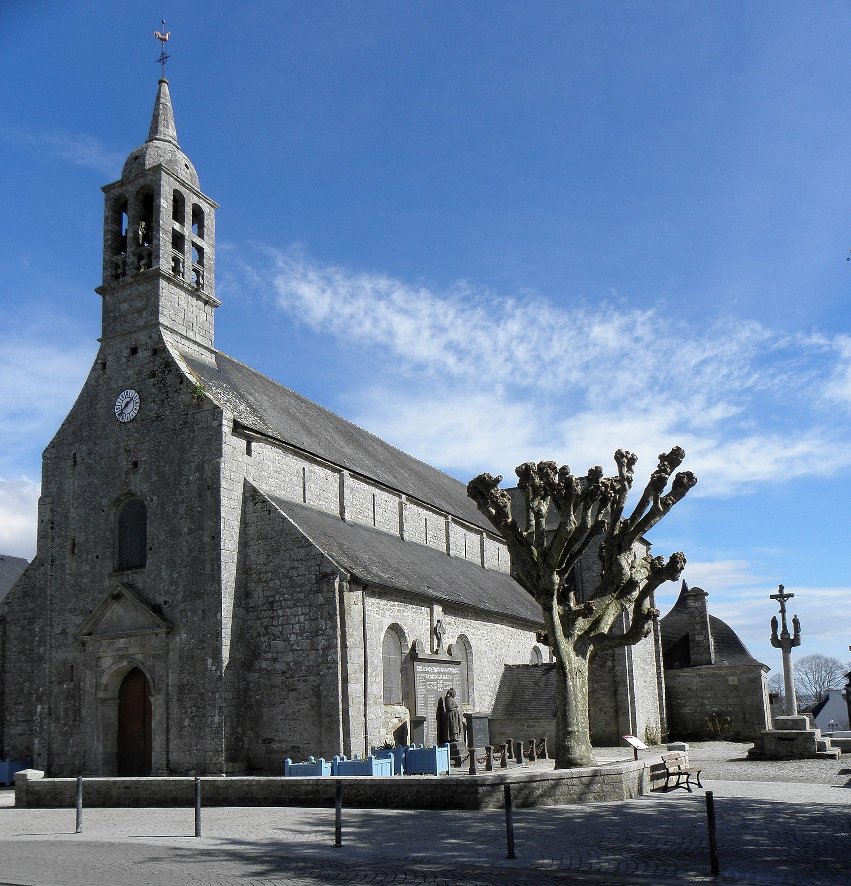 Église Saint-Pierre et Saint-Paul de Fouesnant (29). Façade occidentale et flanc sud.